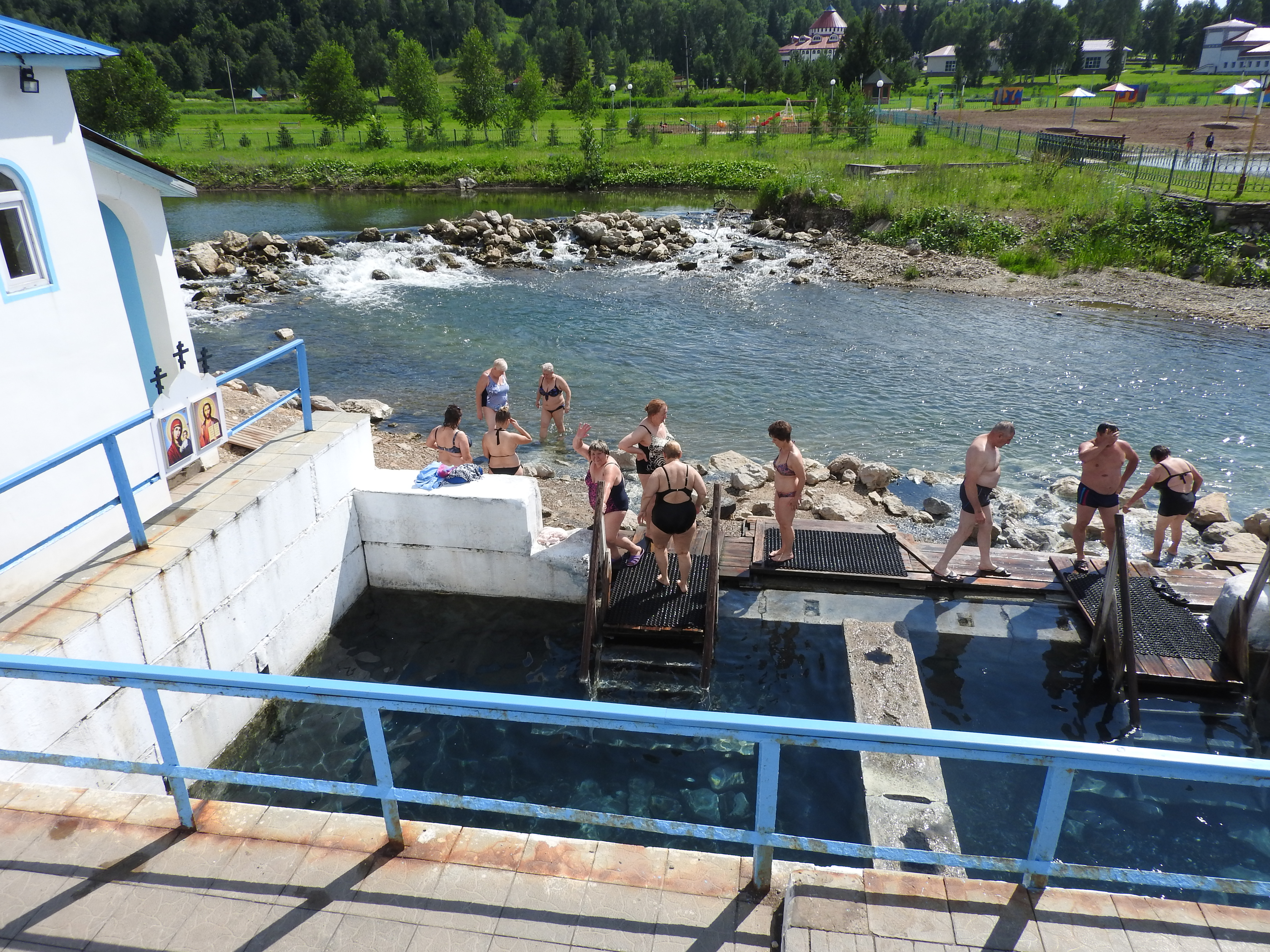 Иордан в красноусольске